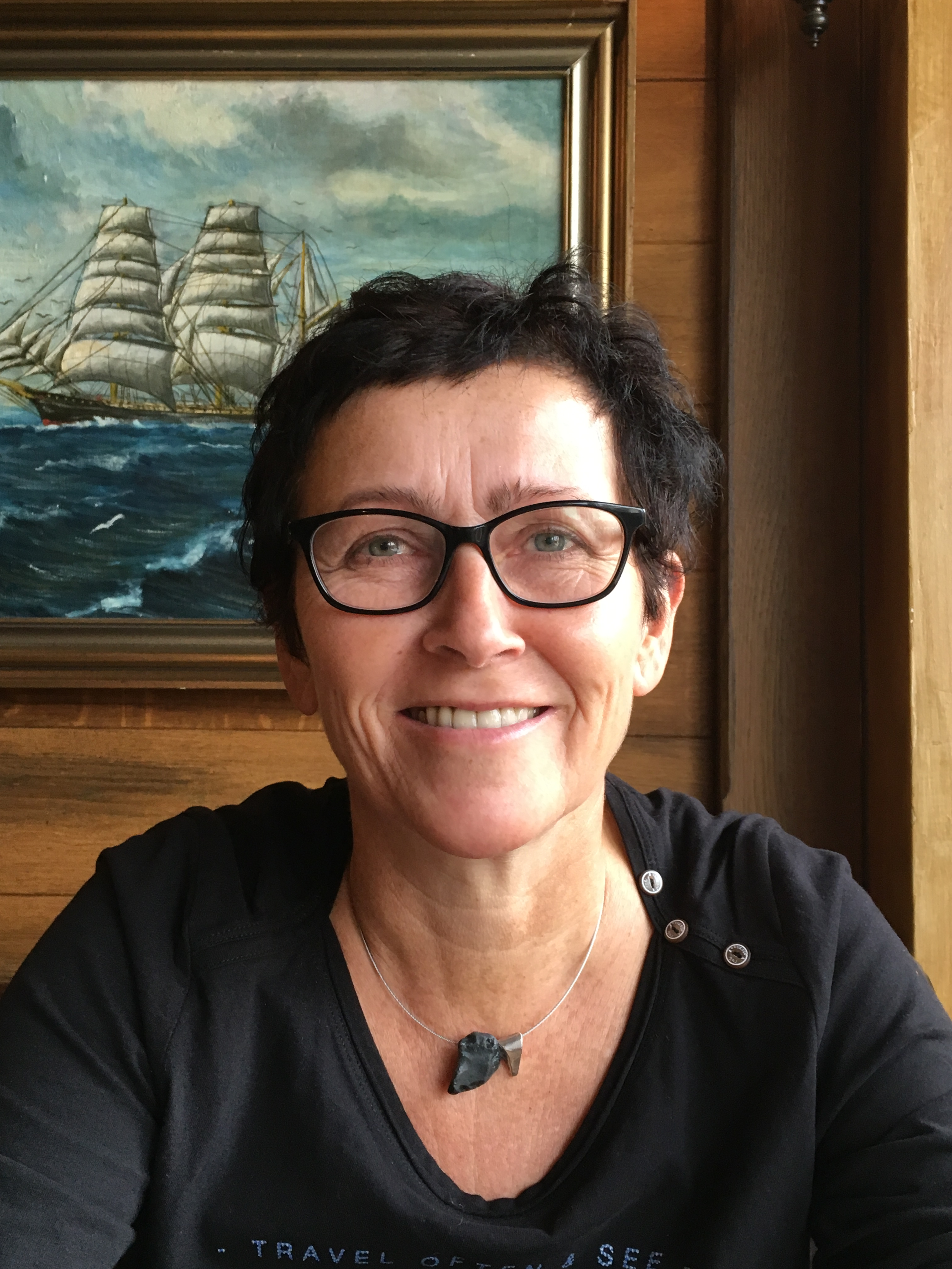 Weltmeisterin im Eisschnelllauf 1989 in Lake Placid USA. (Aufnahme 2016)